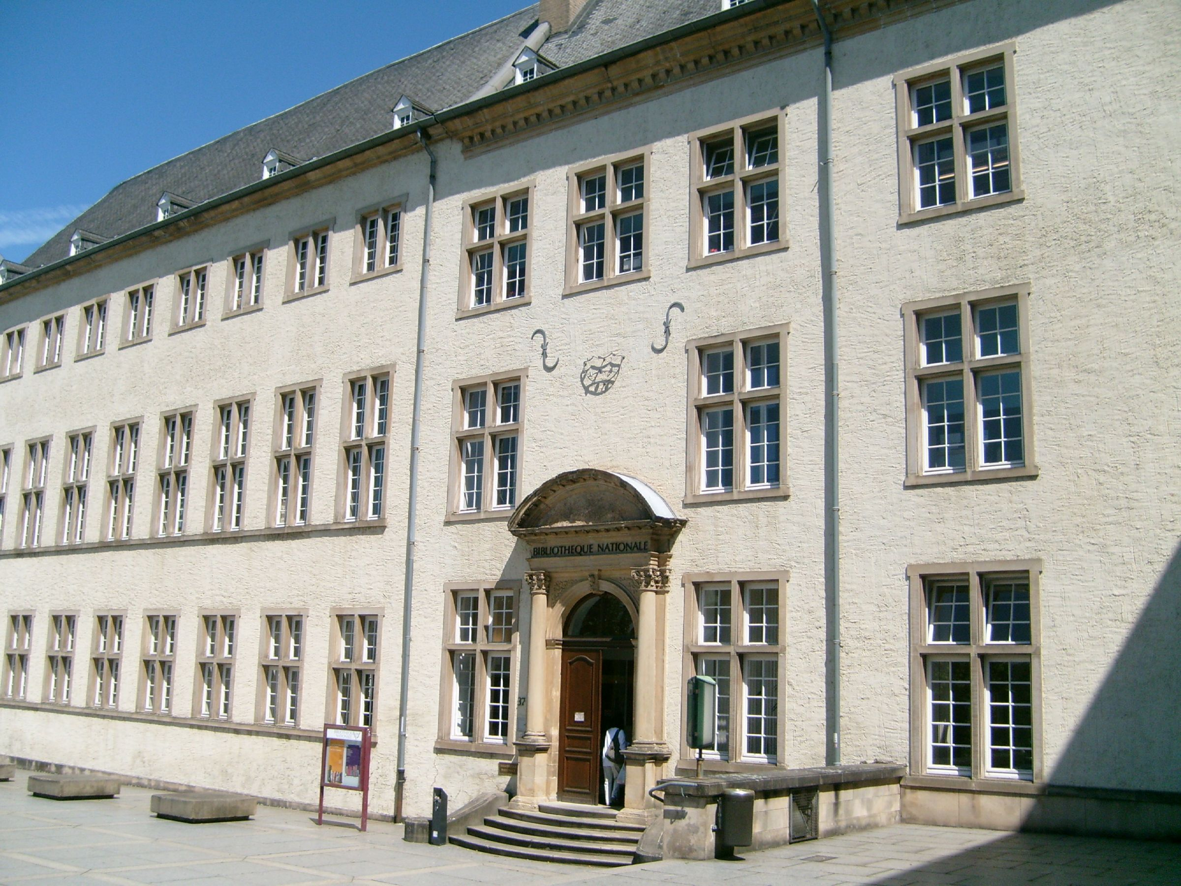 Sujet: d'Lëtzebuerger Nationalbibliothéik - 11. Juni 2008 Auteur: User:PlayMistyForMe Source: eege Foto